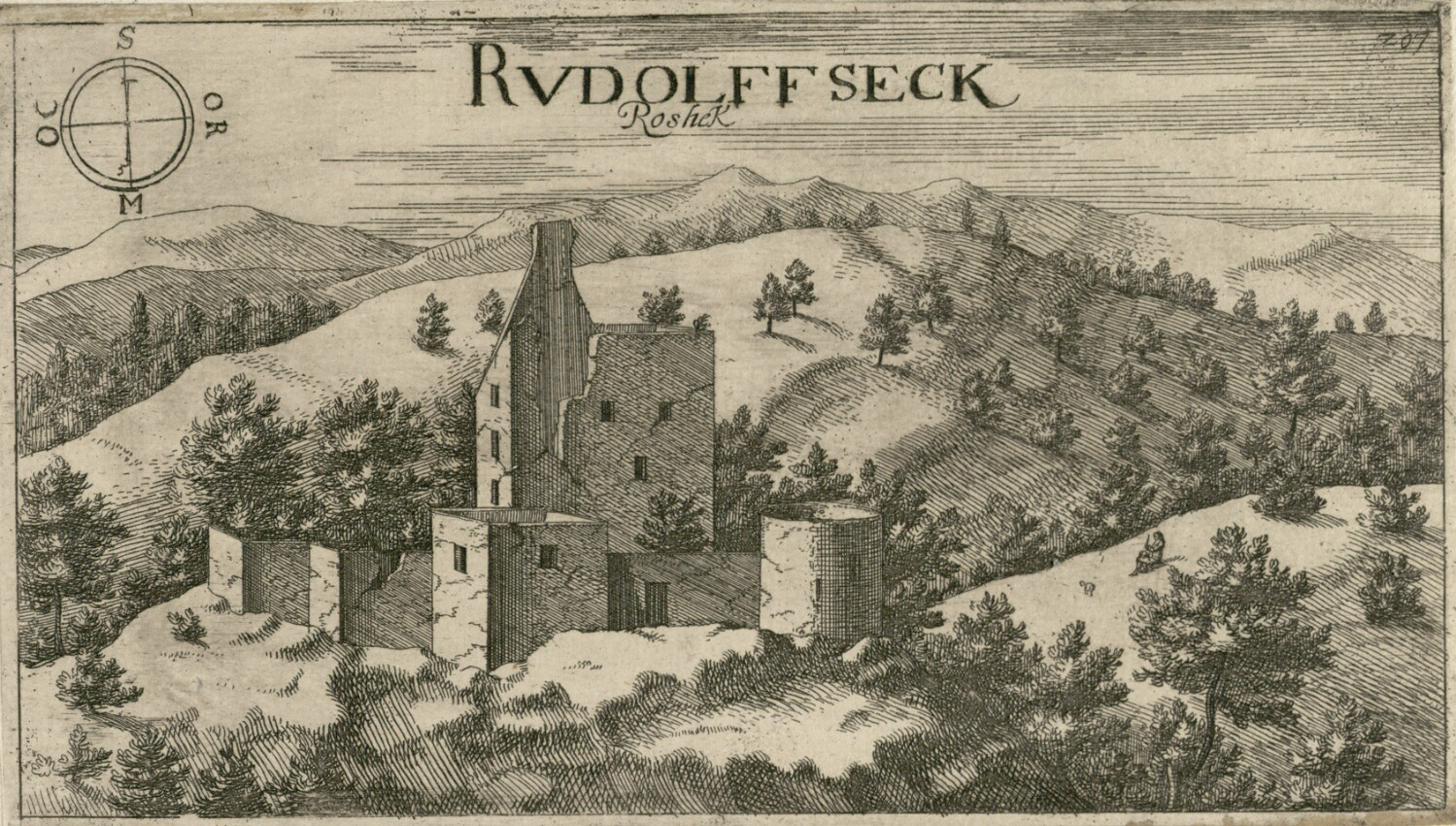 Grad Rožek (Rudolfseck)